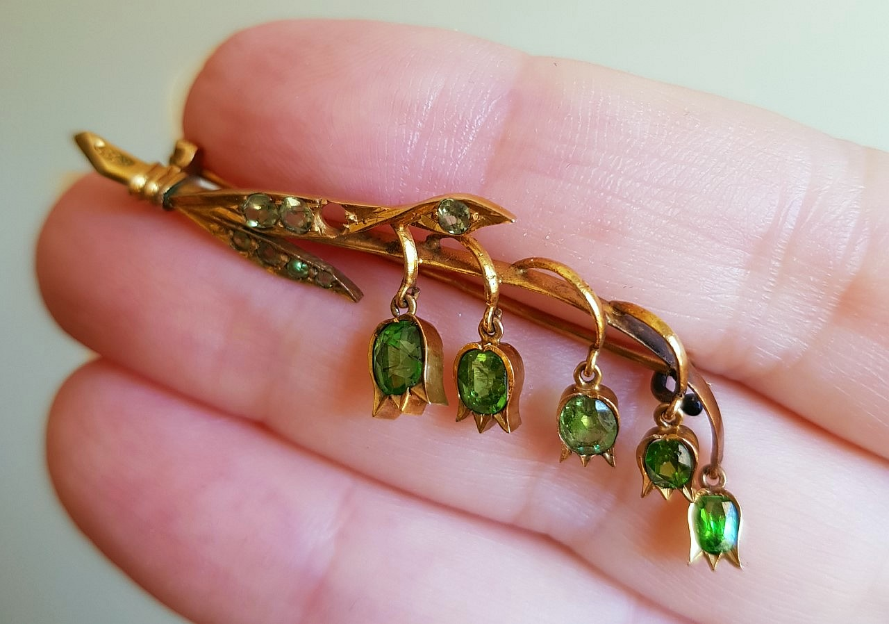 Брошь "Ландыш" с демантоидами, золото. Екатеринбург, 1908-17